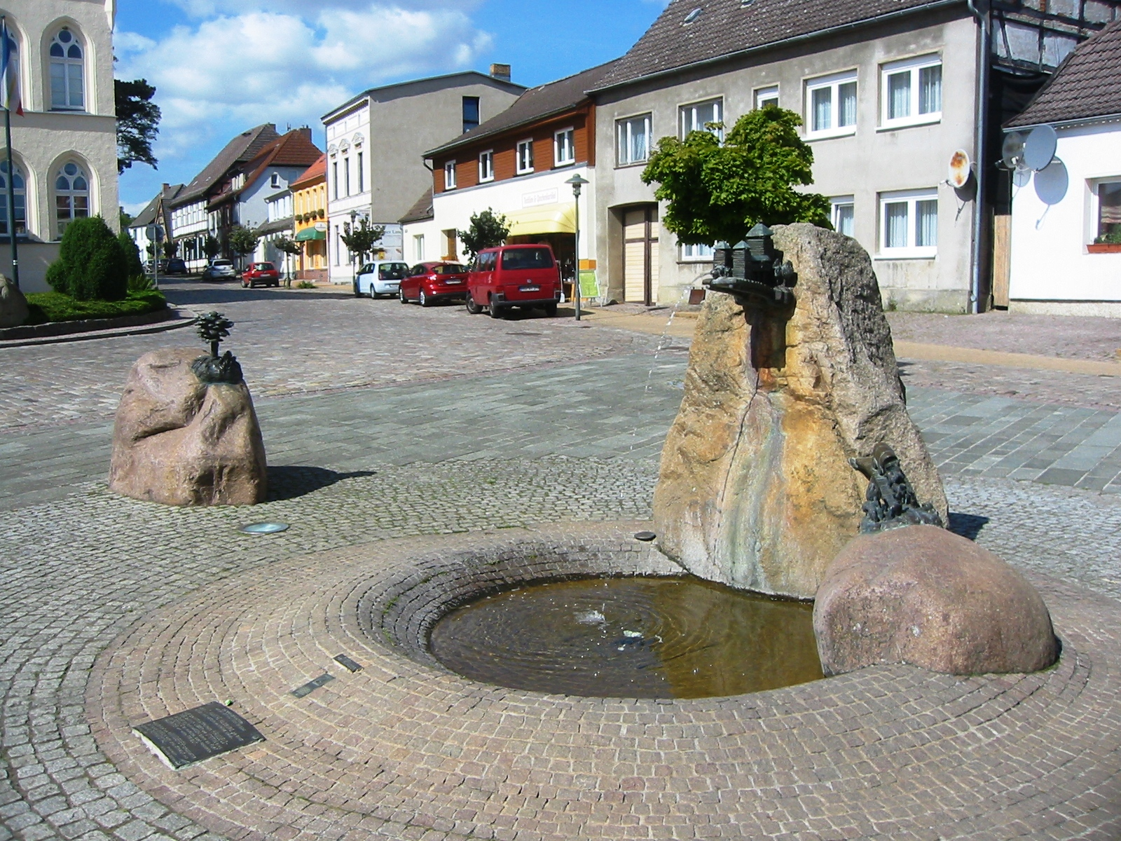 Brunnen von Reinhard Dietrich vor dem Rathaus Marlow. Drei Bronzeplastiken auf je drei Findlingen zeigen typische Szenen aus der Geschichte in der Region. So ist eine slawische Holzburg zu sehen, die einst auf einer Anhöhe westlich der Kirche stand. Daneben zeigt eine Darstellung Ritter, die auf dem Handelsweg von Lübeck nach Stettin einen Händler überfallen, der die Furt in Recknitz nutzte. Schließlich ist ein Wanderer abgebildet, der mit seinen drei Enkeln in das Recknitztal schaut.